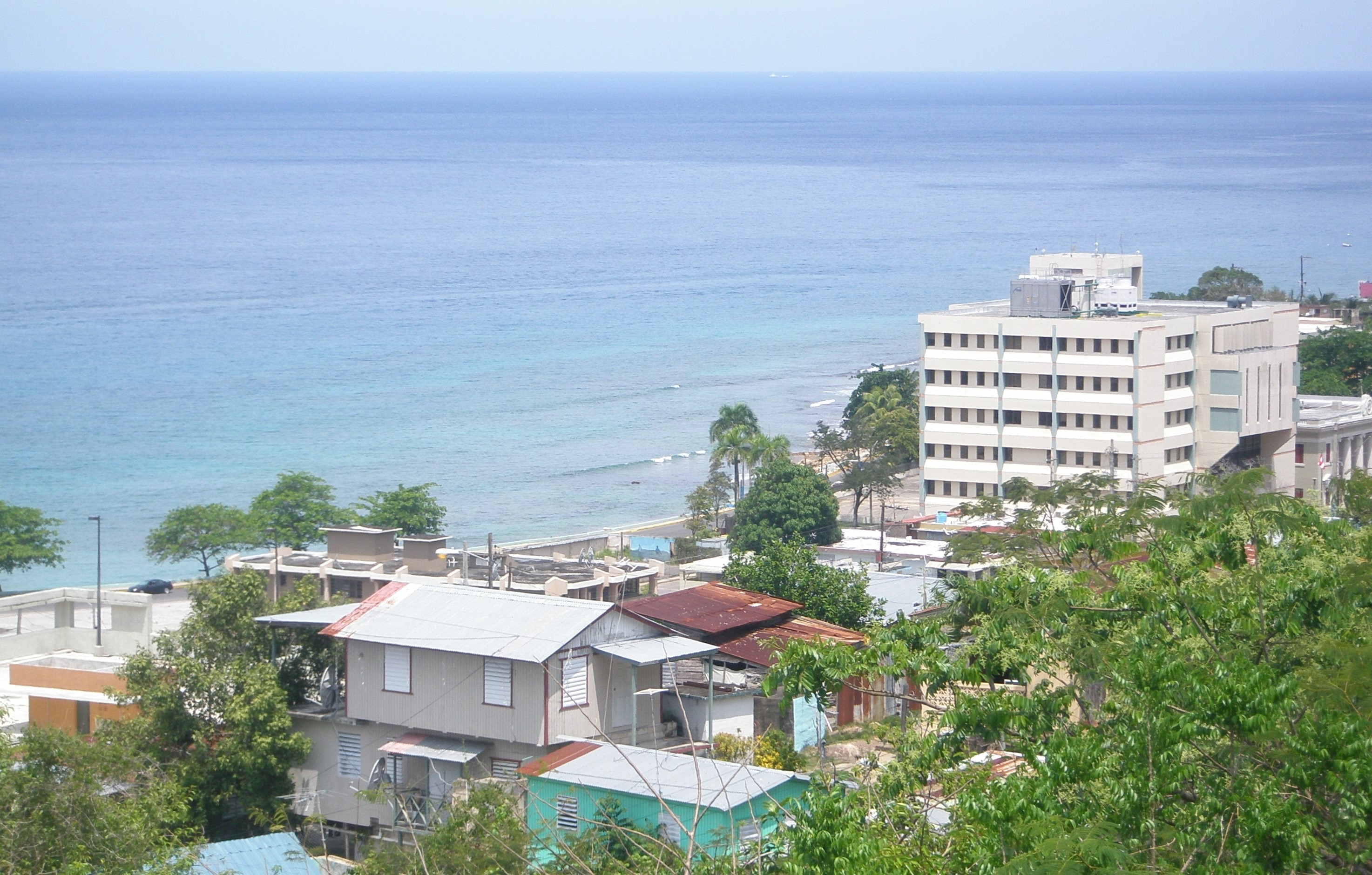 Vista de aguadilla